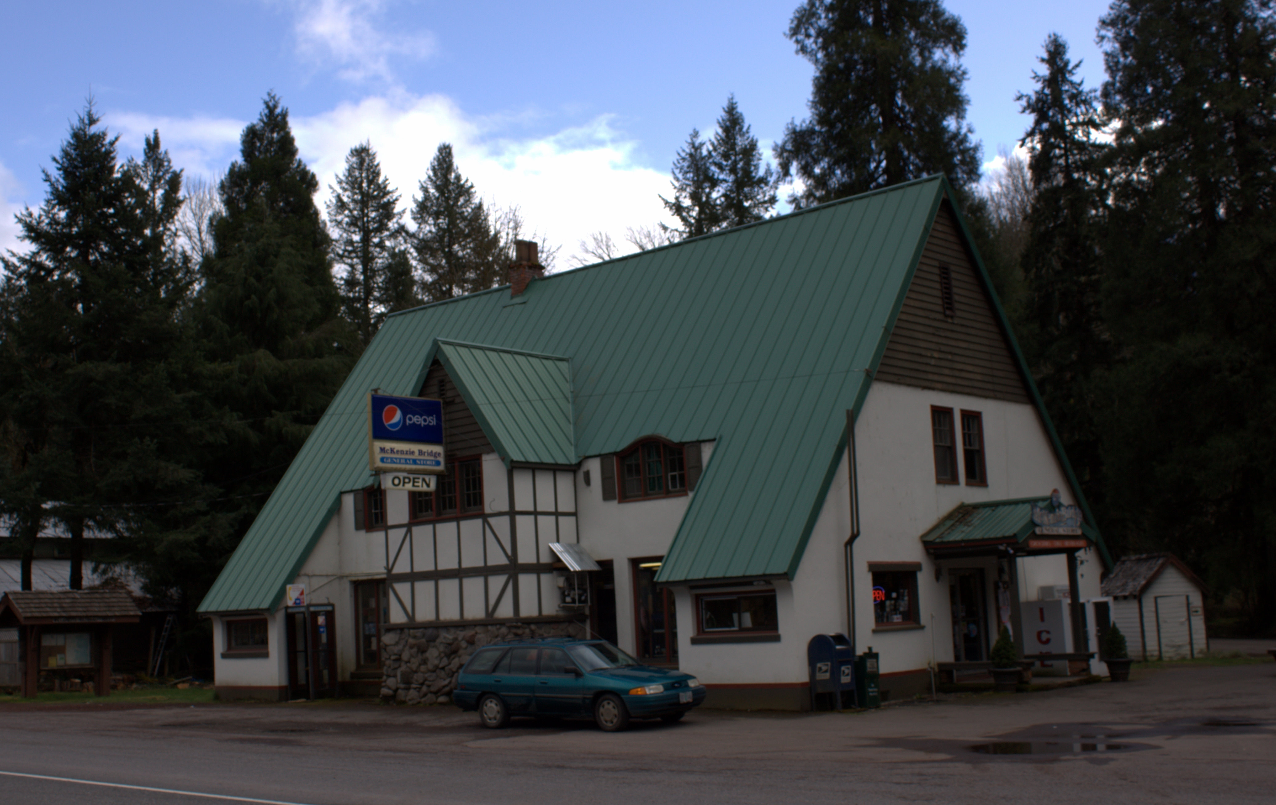 McKenzie Bridge general store